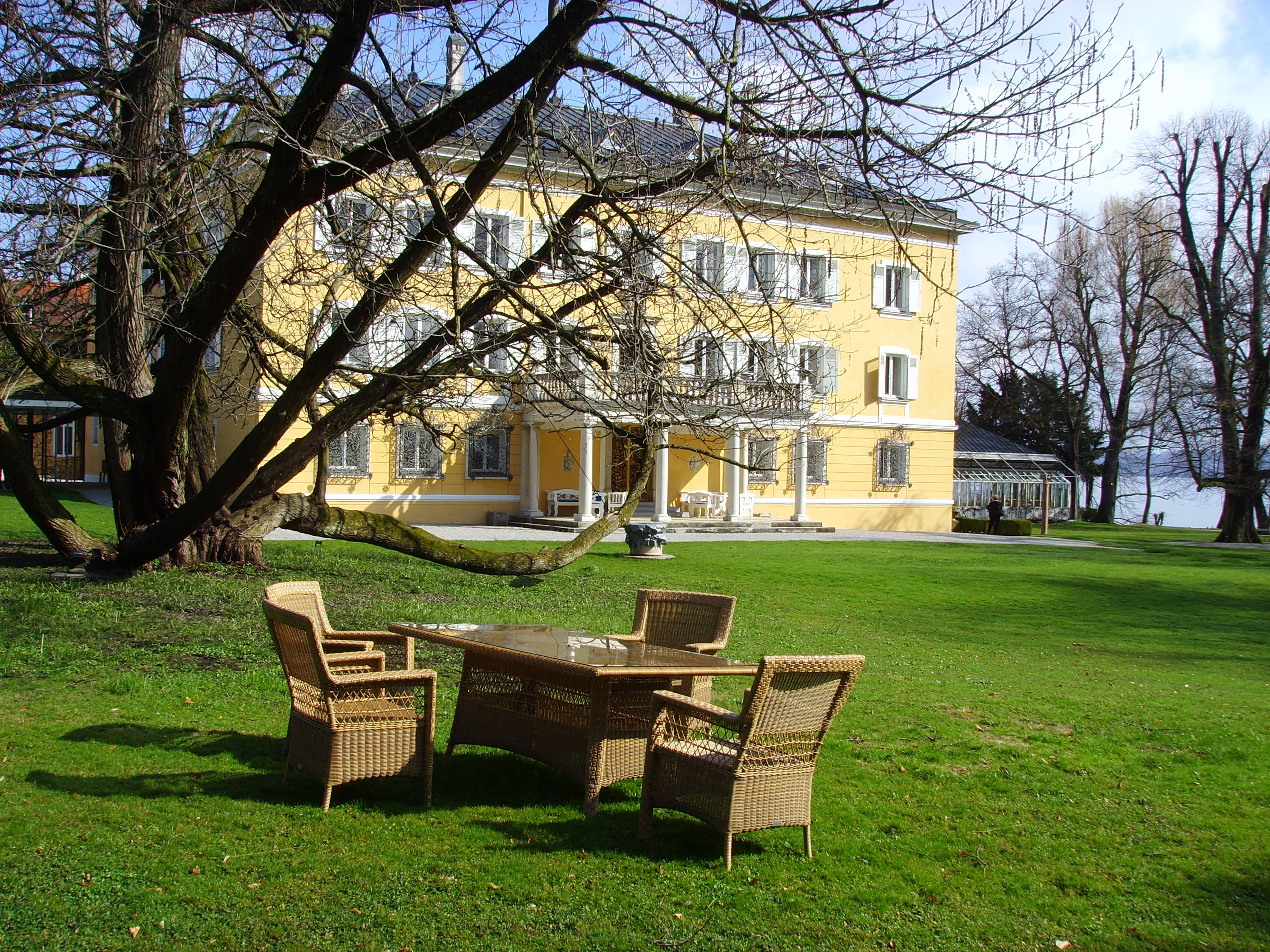 Schloss Tutzing, Sitz der Evangelischen Akademie. Blick vom Starnberger See zum Haupthaus